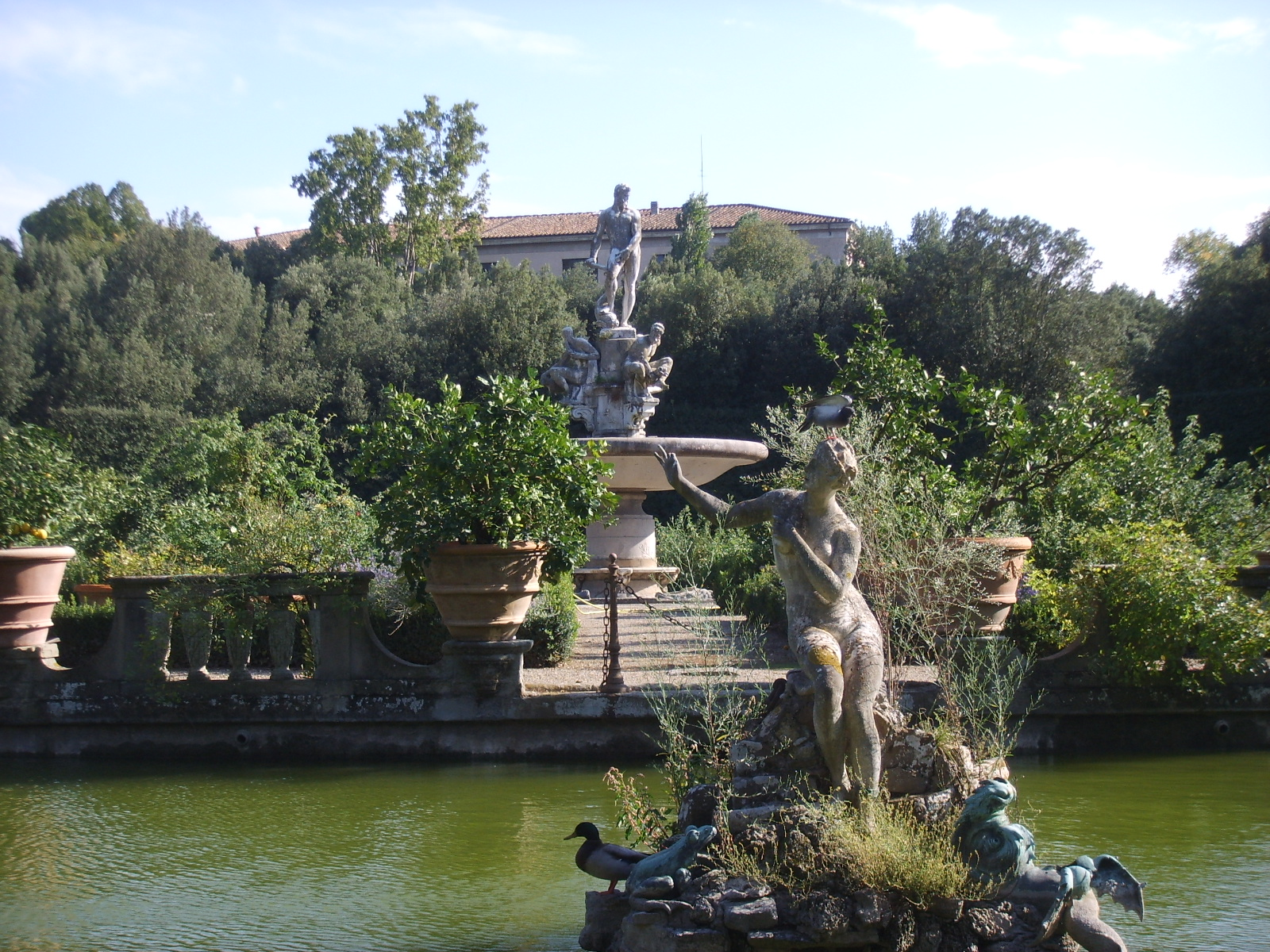 Giovanni Battista Pierratti (Italien, 1599-1662): Andromède et le monstre, entre 1630 et 1662, marbre blanc et bronze, Il Vasca dell'isola, Jardins Boboli du Palais Pitti, Florence, Italy